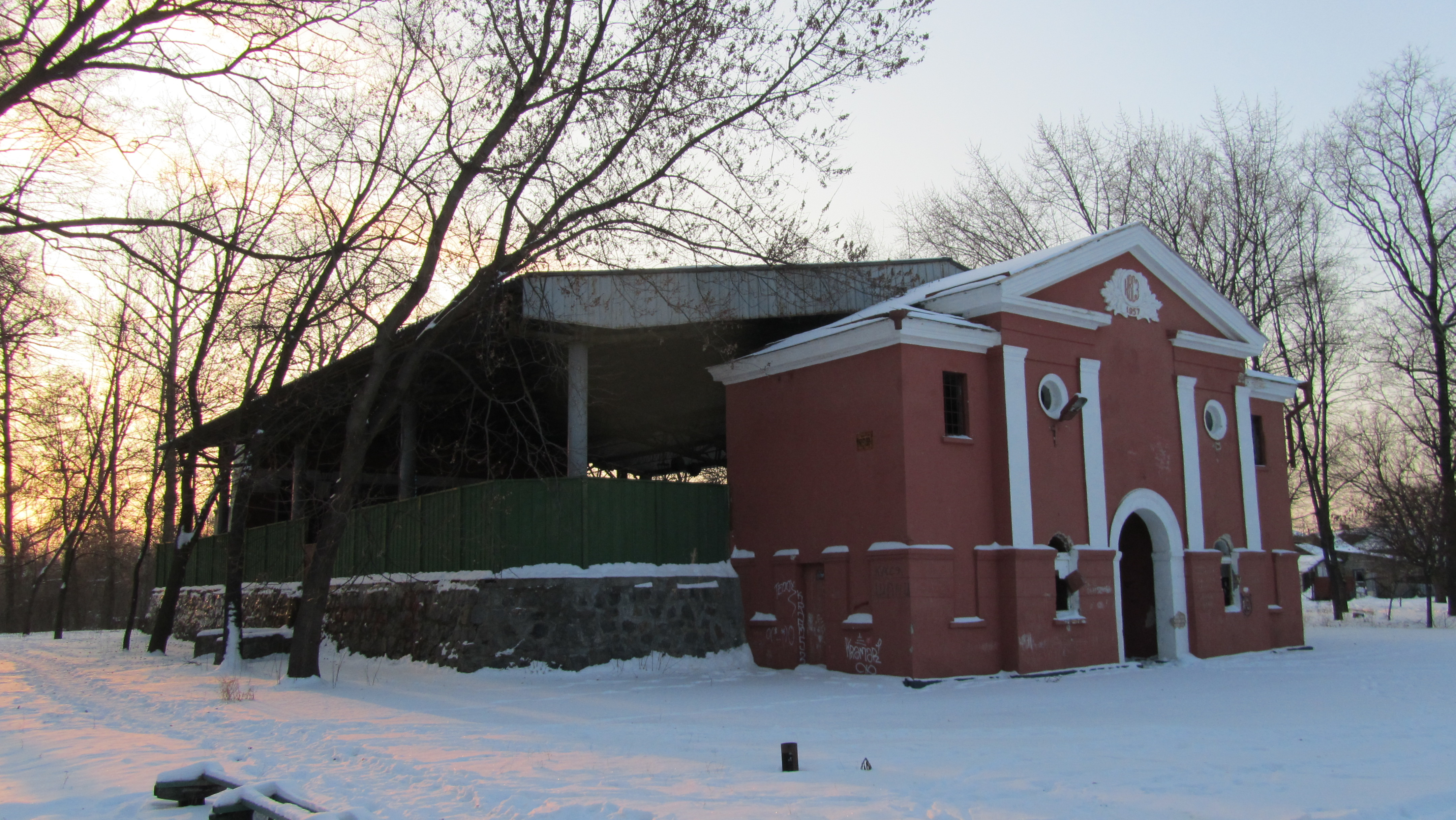 Парк Крюківського вагонобудівного заводу